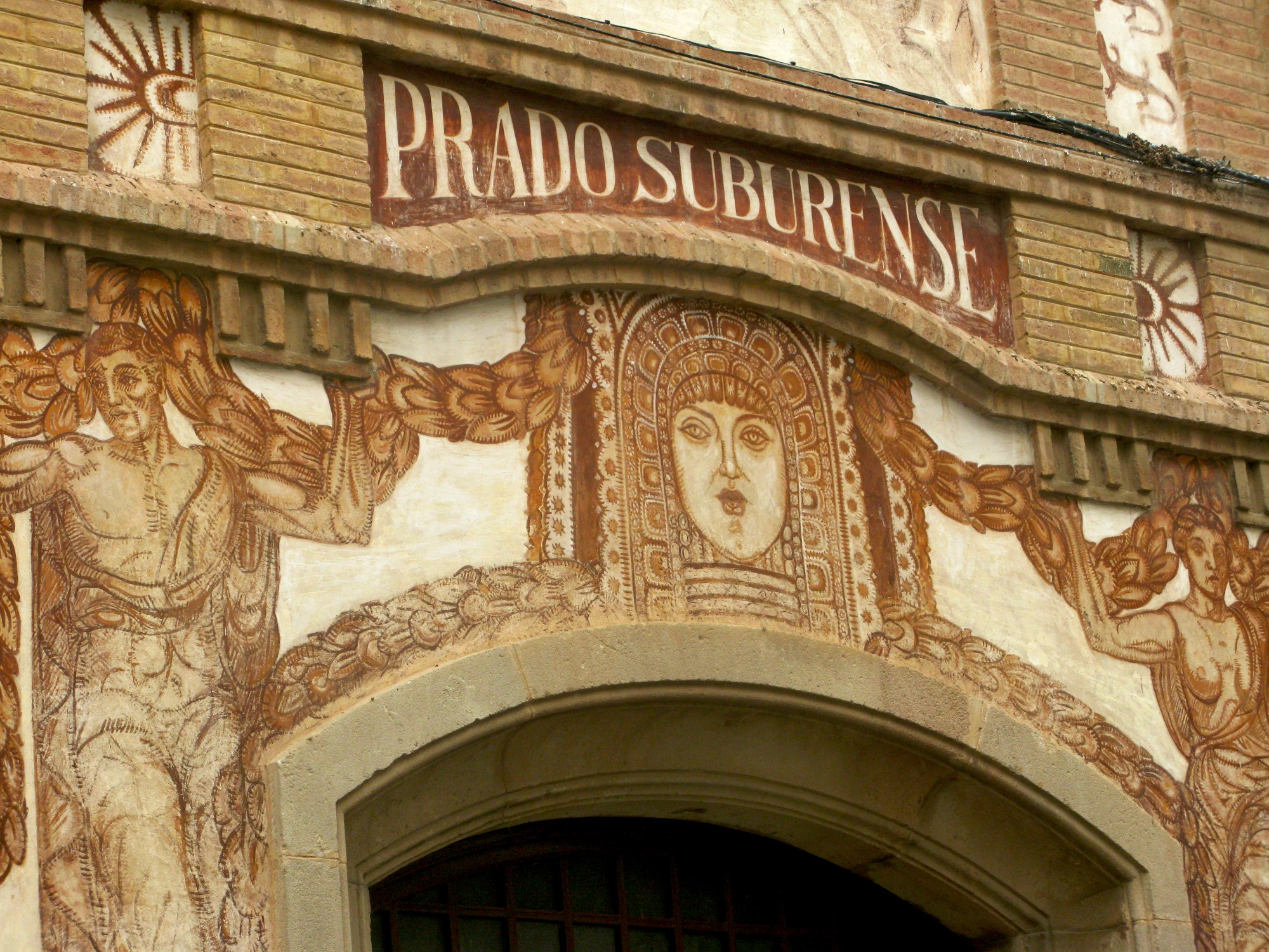 Stiges Catalogne 268